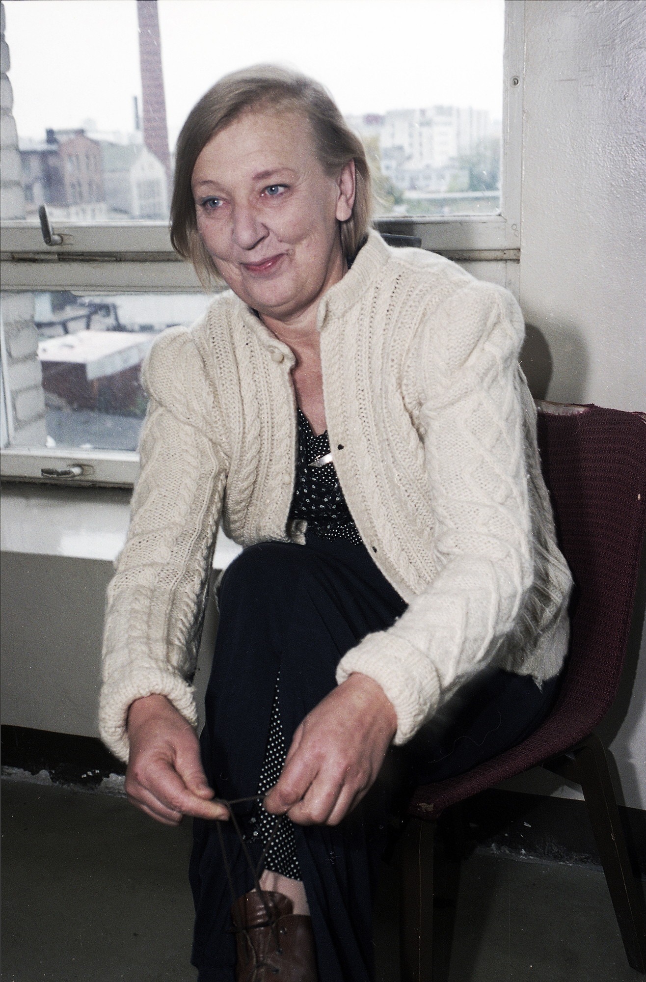 Ines Aru, näitleja 93